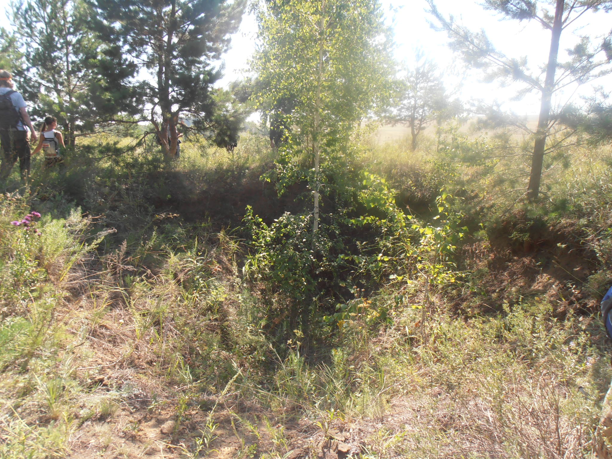 На вершине Хрипуновского могильника в Ингальской долине (Исетский район Тюменской области, к югу от с. Красногорское). Яма, оставшаяся после "работы" грабителей могил (бугровщиков).